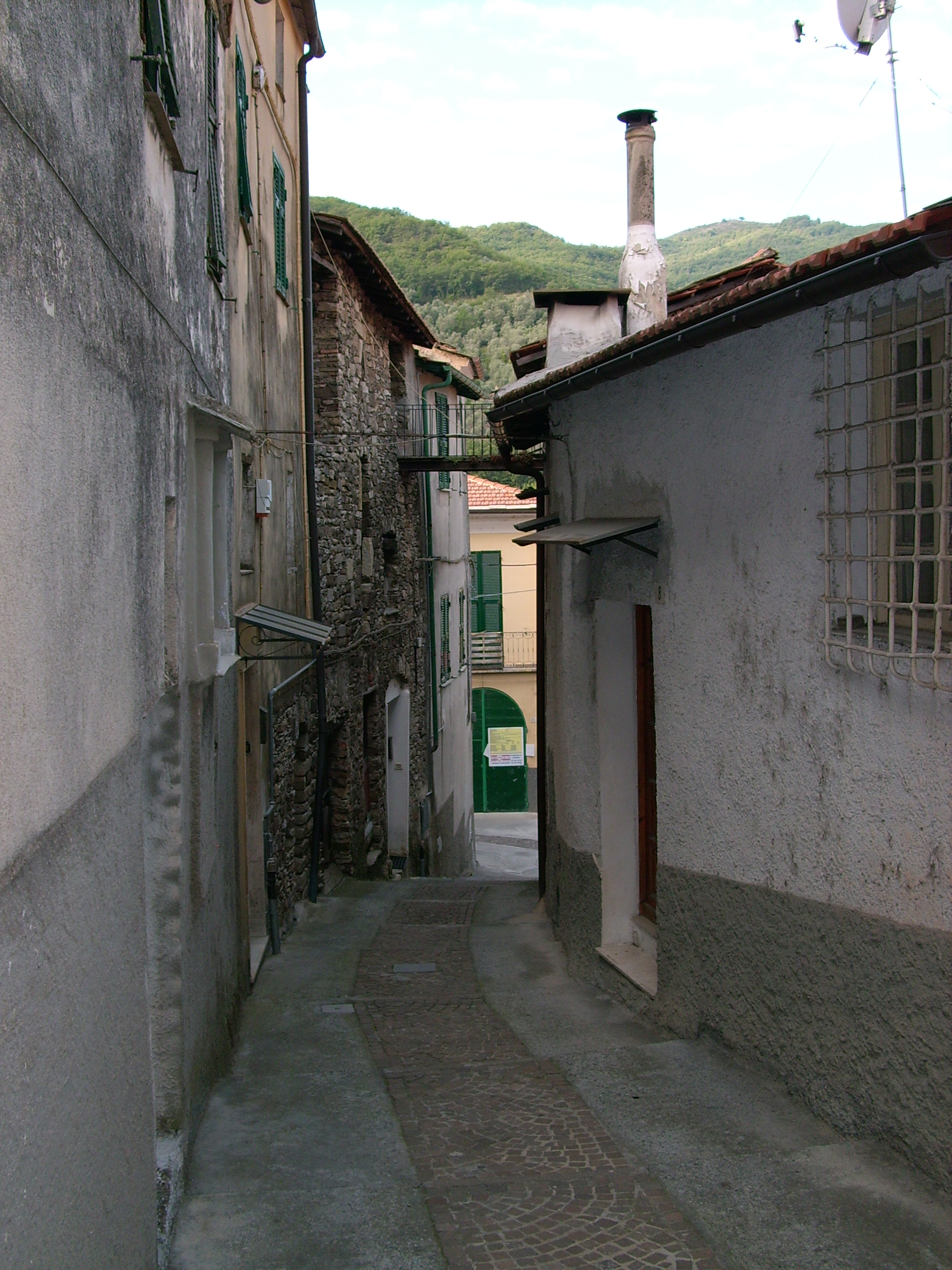 Centro storico di Chiusavecchia, Liguria, Italia